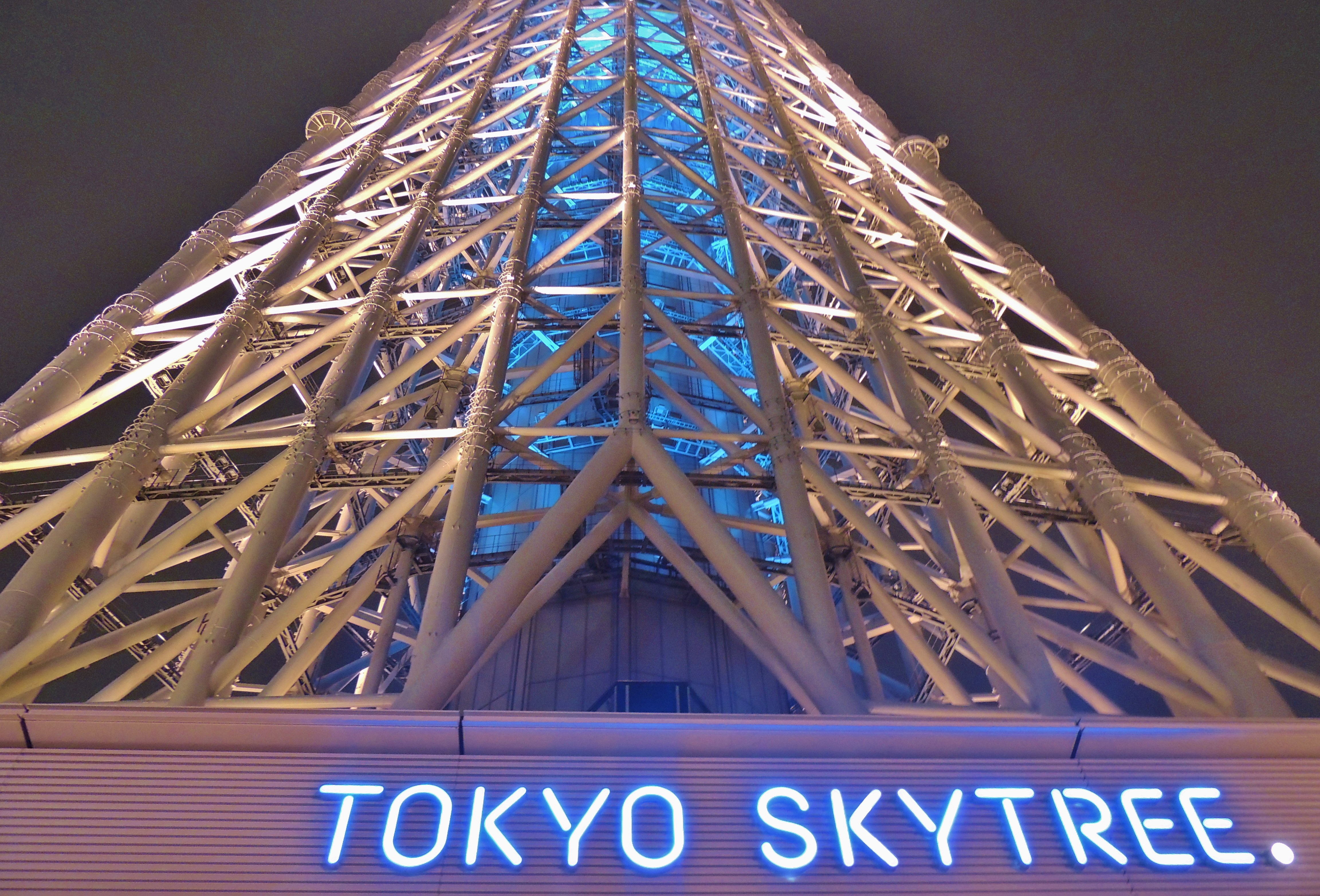 YOKYO SKYTREE